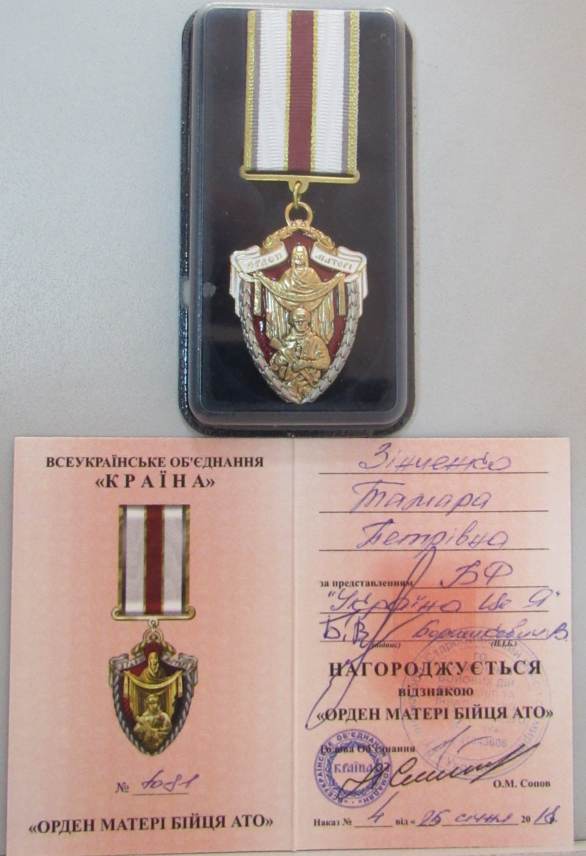 нагороди Богдана